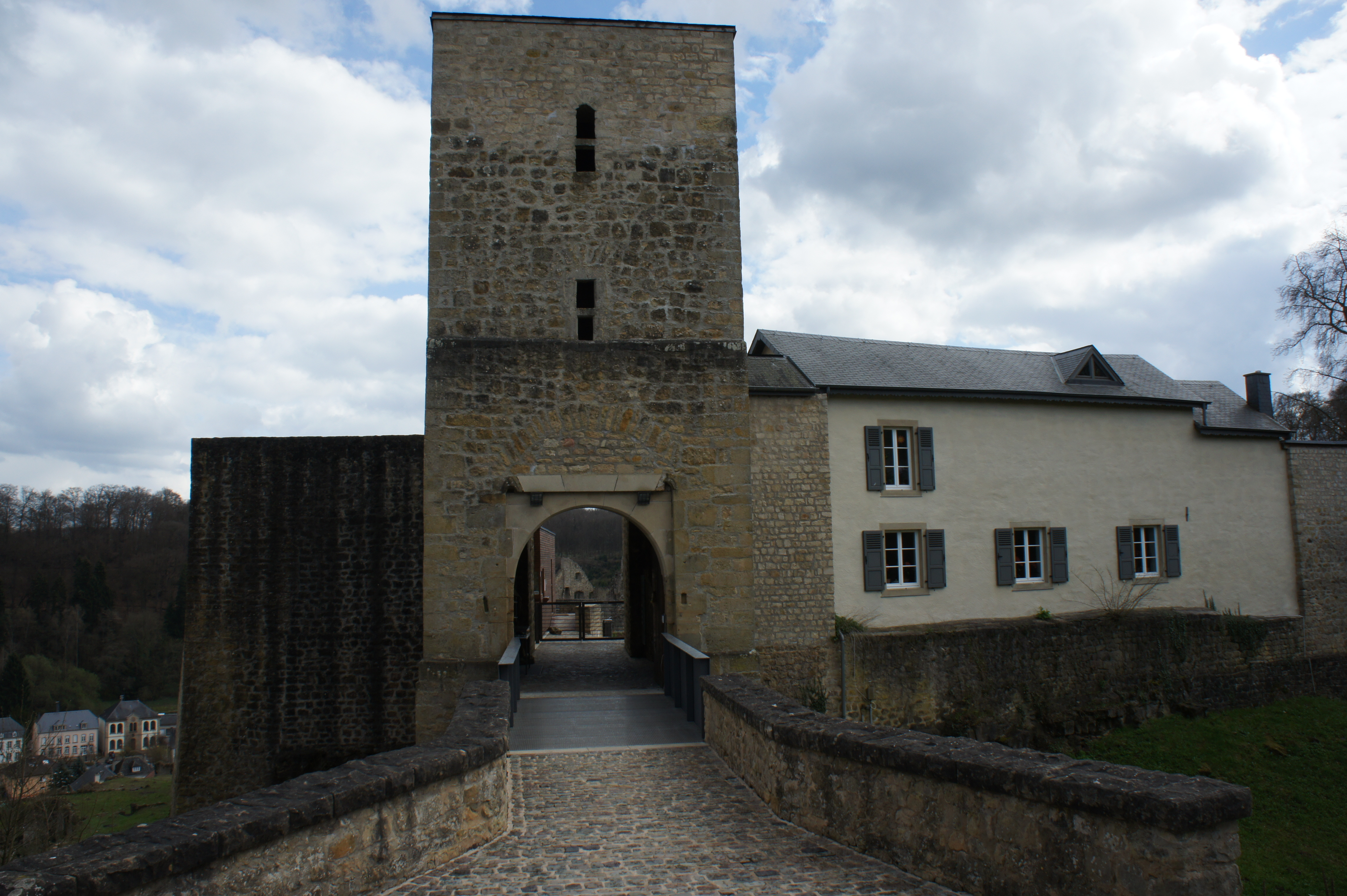 Haupteingang der Burg Fels